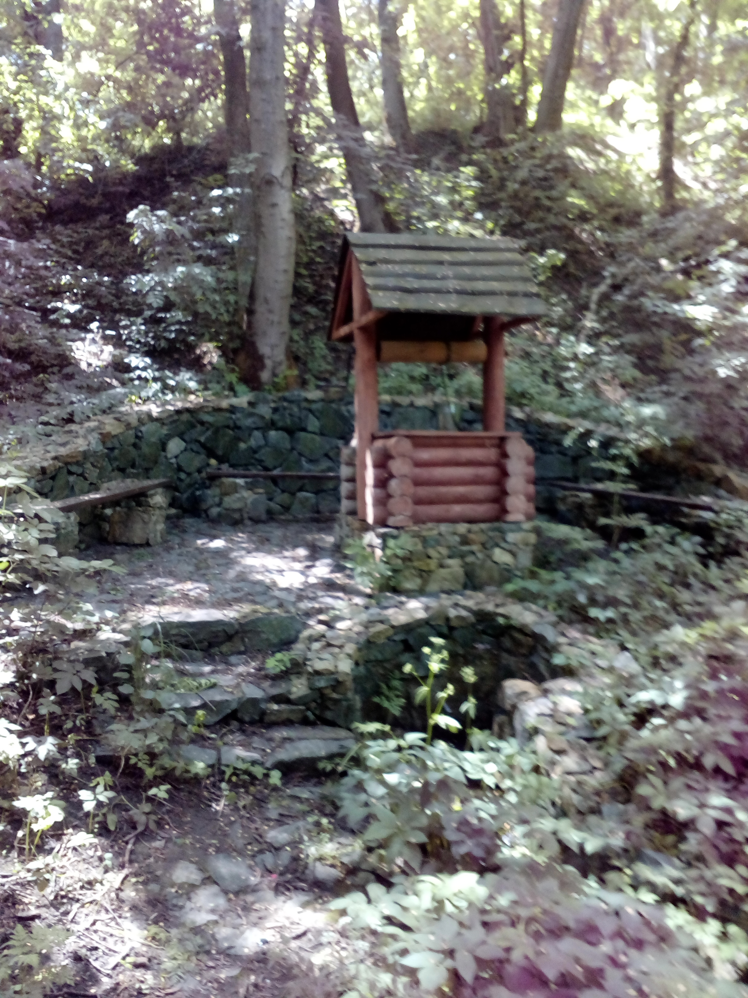 «Казавчинські скелі», Гайворонський район с. Казавчин